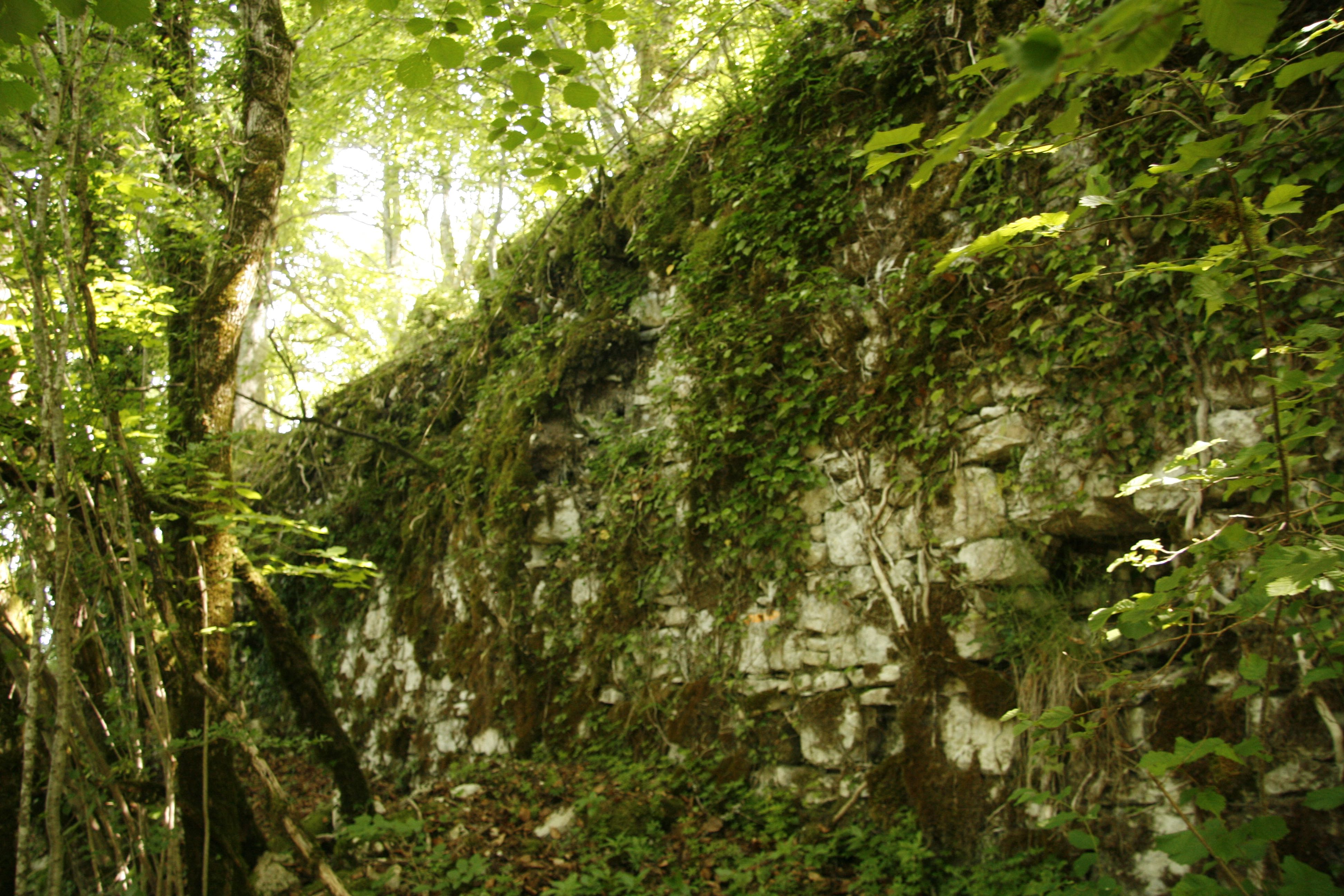 Chateau de Rougemont mur Est